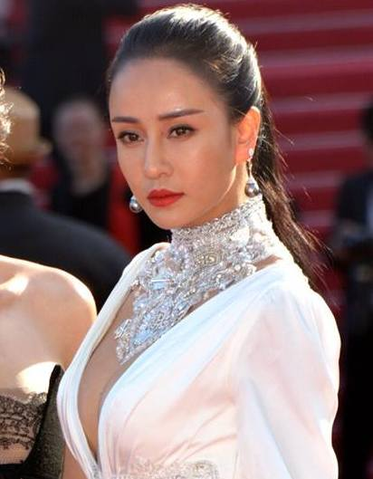 festival de Cannes